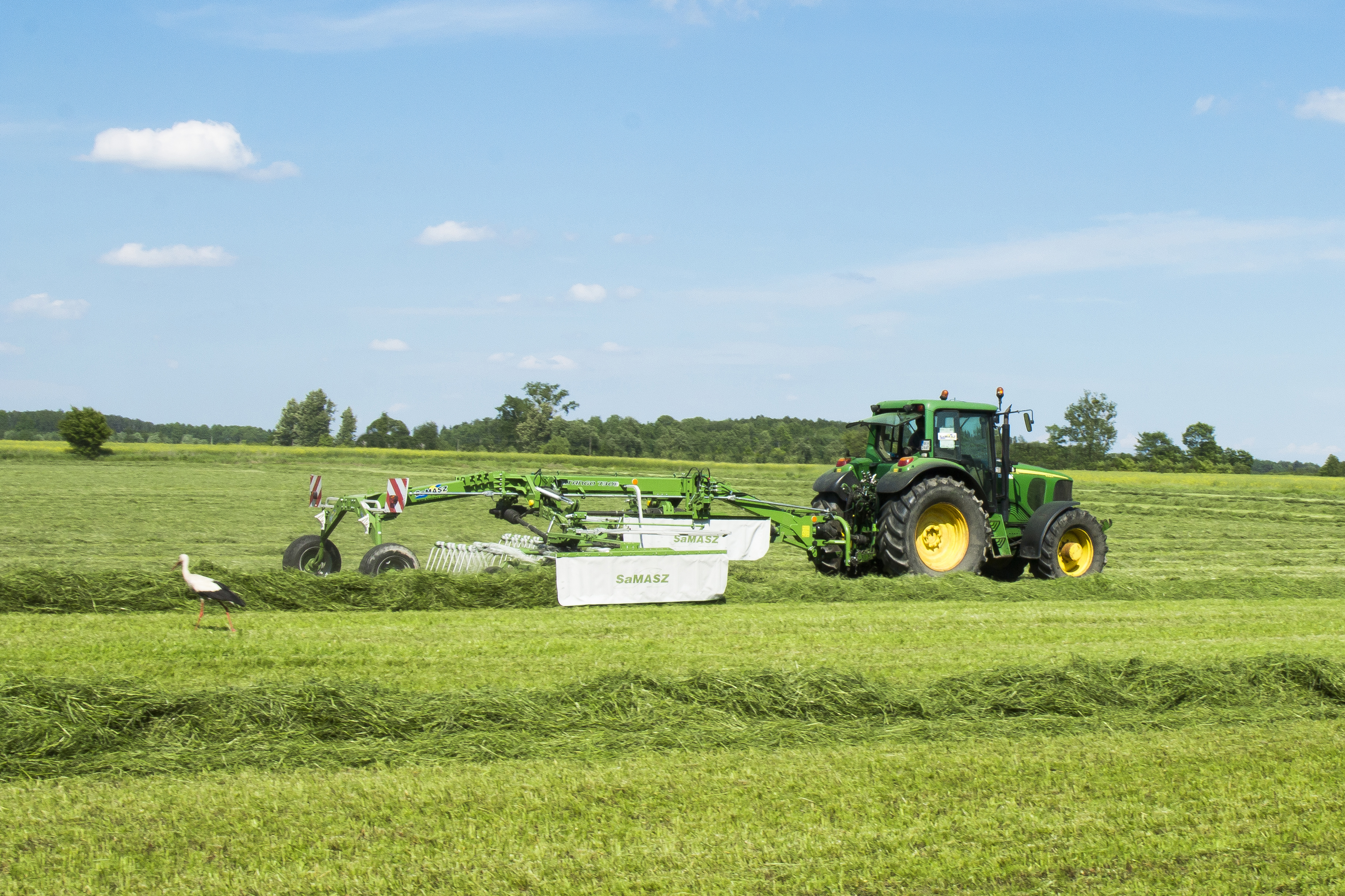 Zgrabiarka 2-karuzelowa SaMASZ Tango 730 o szerokości roboczej 7,3 m